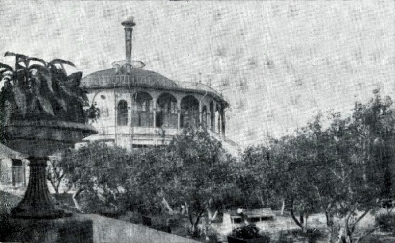 Старое здание Южного речного вокзала Москвы. Вид со стороны сада.